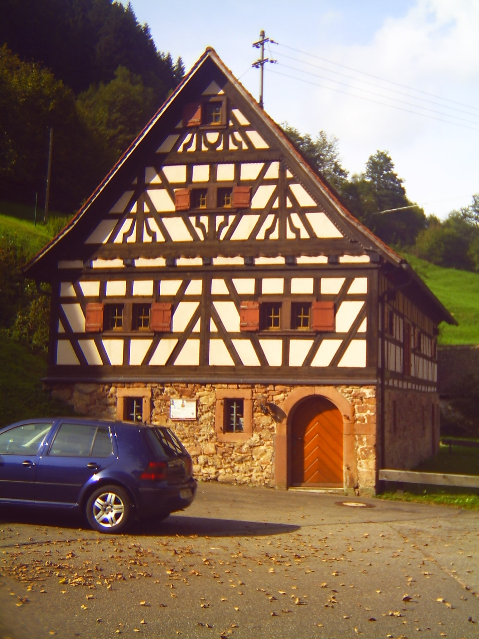 Convent Museum Wittichen